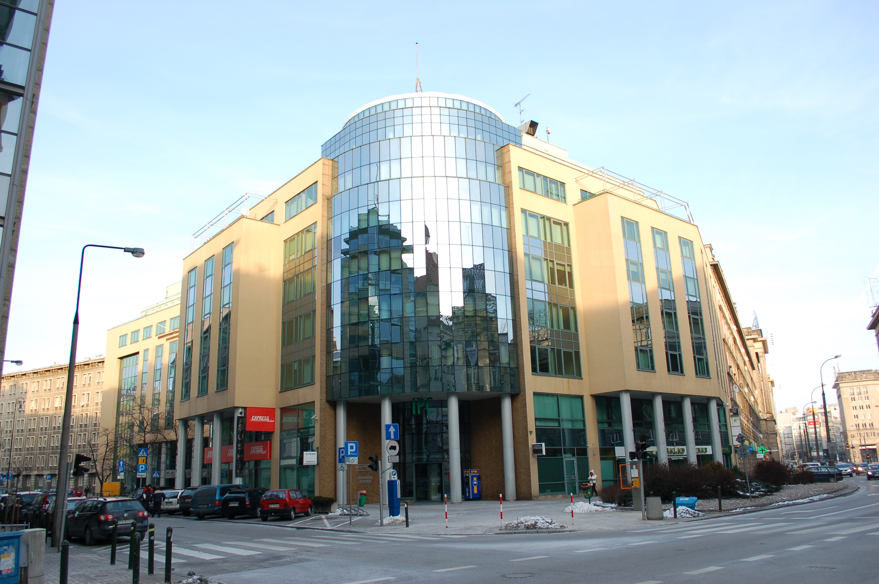 Koszykowa Street 54, Warsaw